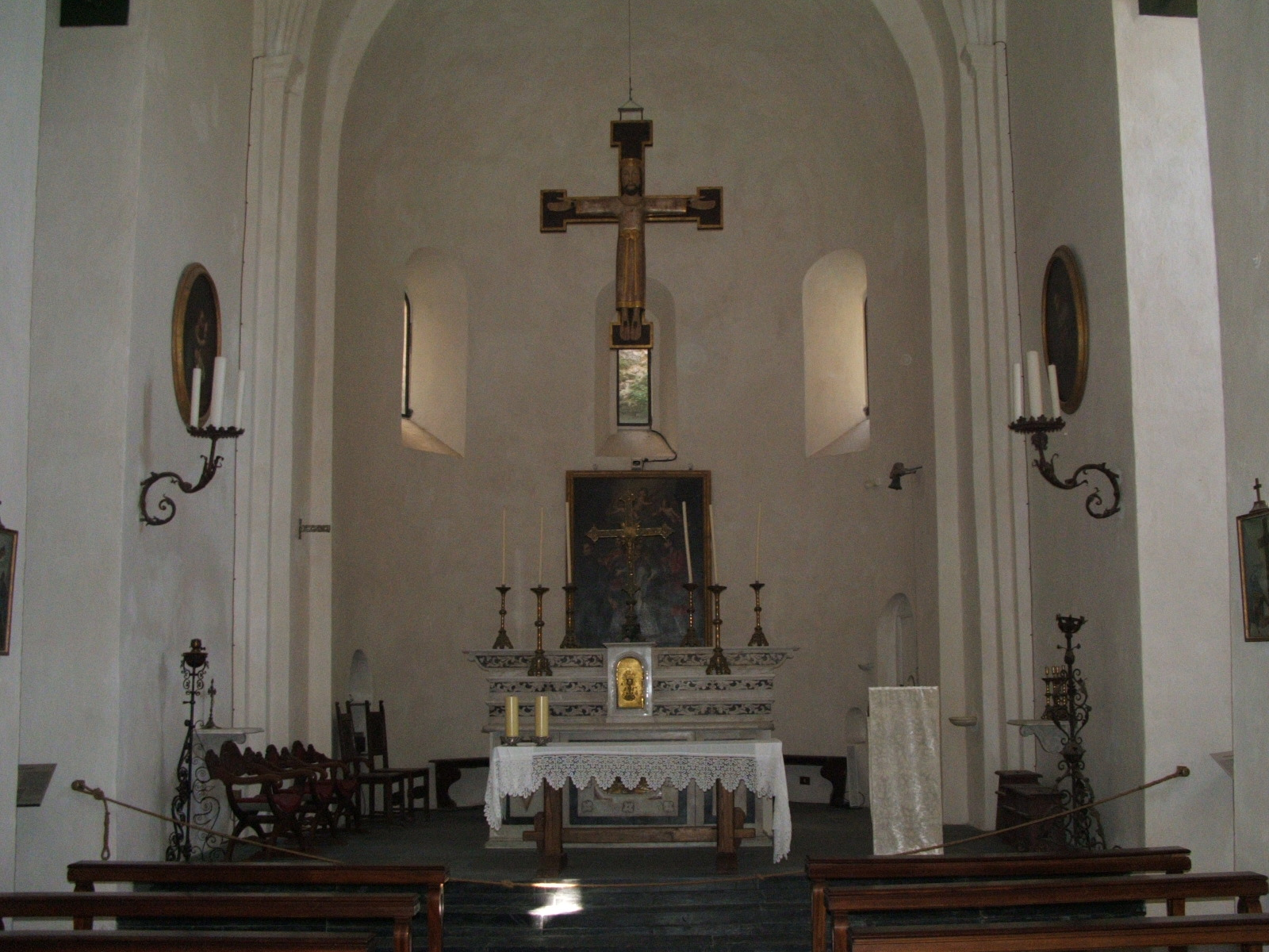 Camogli, Abbazia di San Fruttuoso. Fotoripresa autorizzata